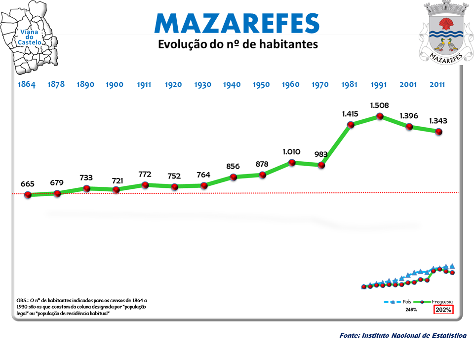 Censos 1864/2011